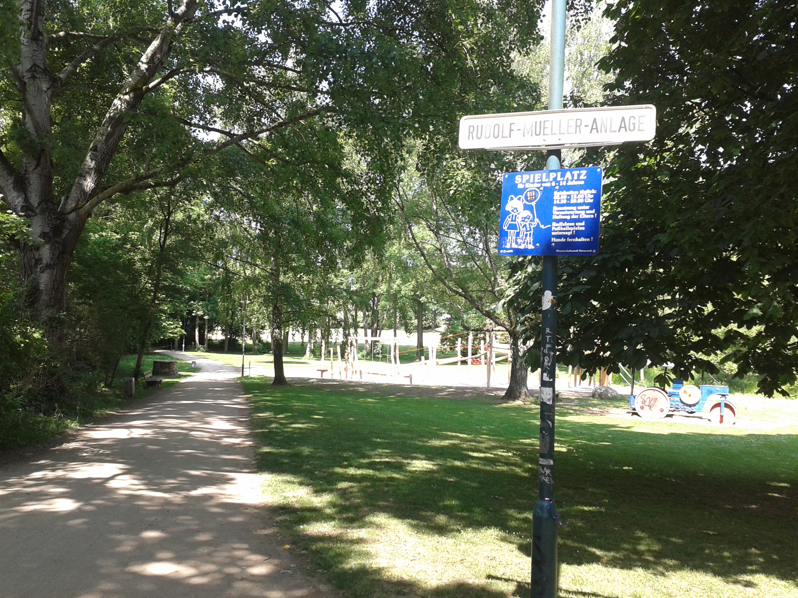 Rudolf-Mueller-Anlage in Darmstadt am 22.Mai 2015